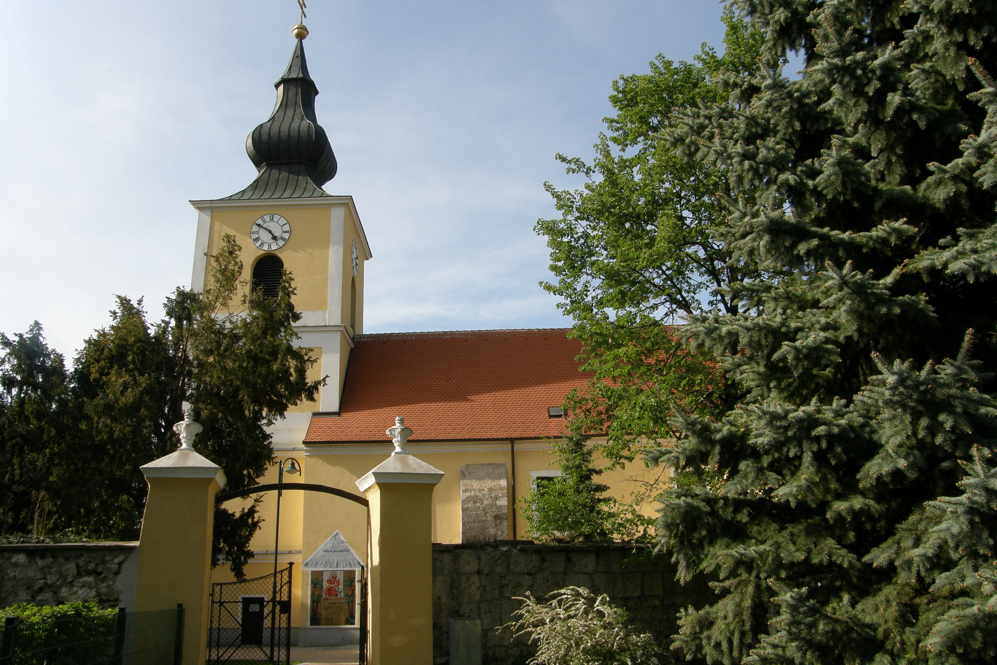 Kath. Pfarrkirche hl. Martin